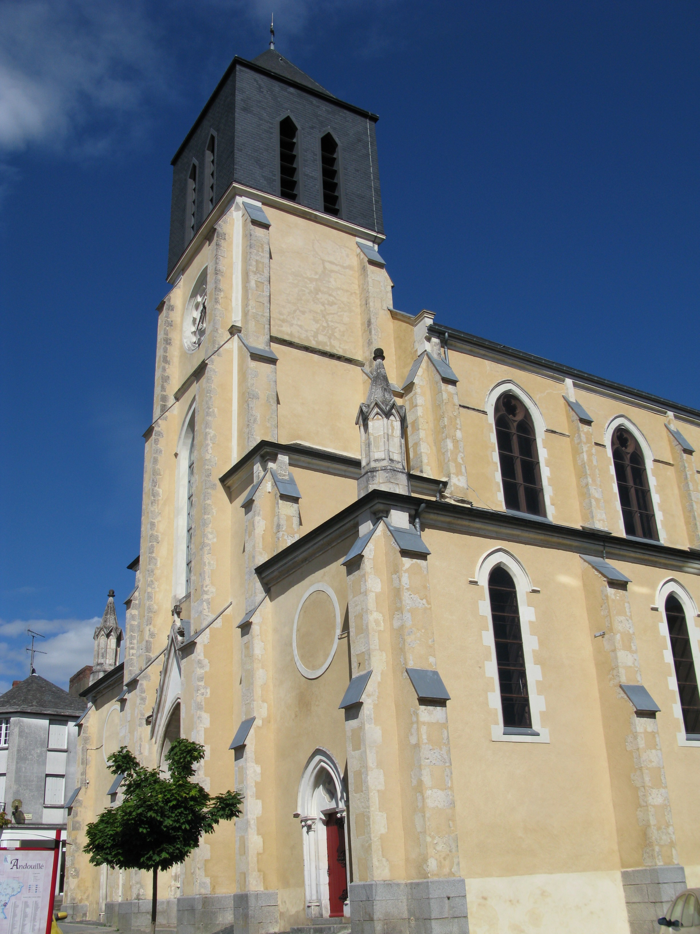 Église d'Andouillé